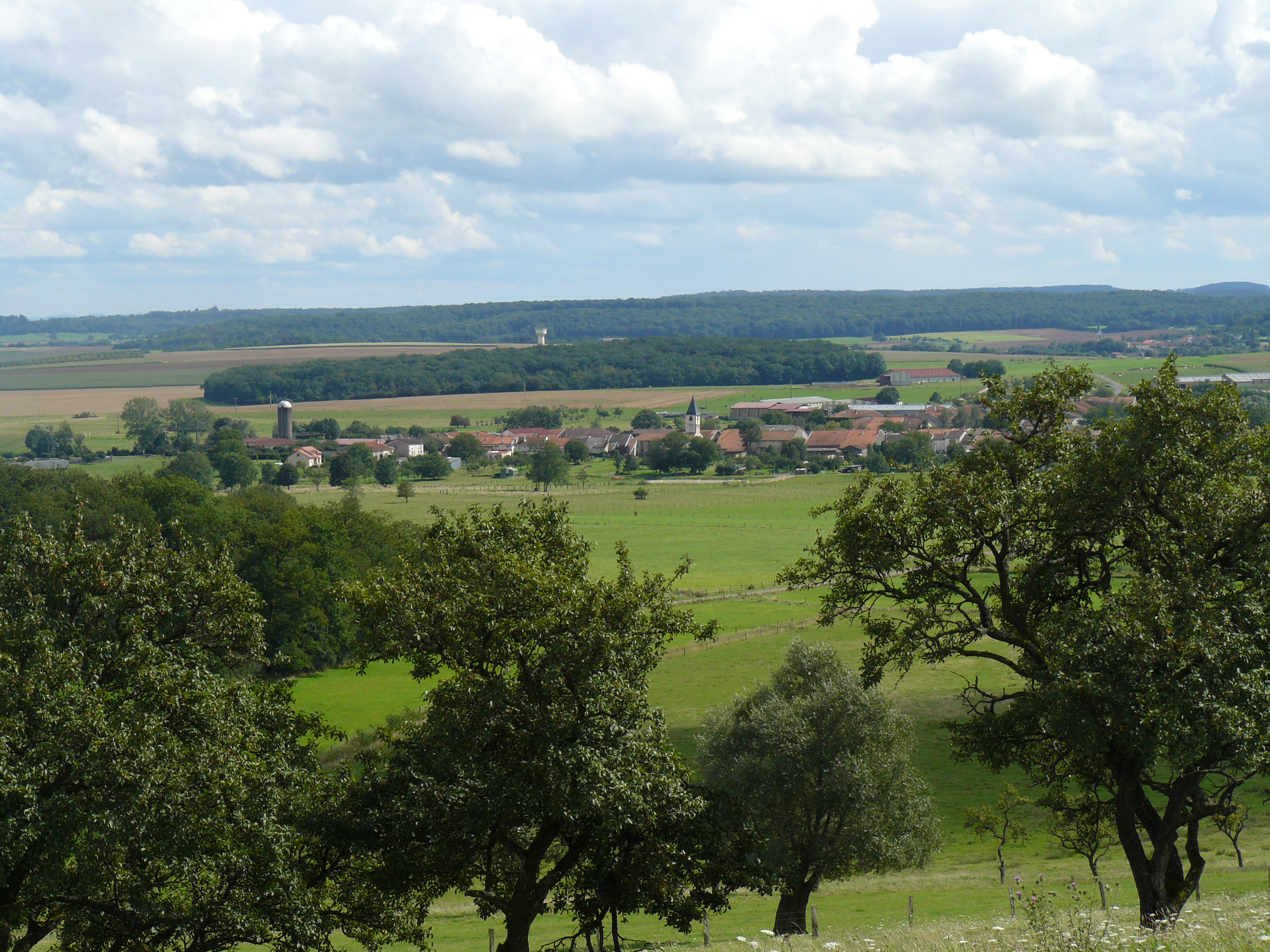 Vue d'Oëlleville depuis les vergers du Haut de la vigne (limite de la commune avec Chef-Haut). Derrière le village, le bois de Franquillon (limite de la commune avec Rouvres).